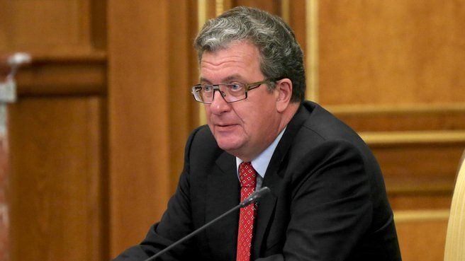 Заместитель Председателя Правительства — Руководитель Аппарата Правительства Сергей Приходько на заседании Правительства